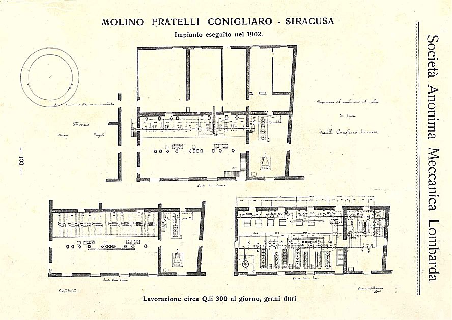 Molino fratelli Conigliaro - Siracusa - impianto eseguito dalla SAML nel 1902